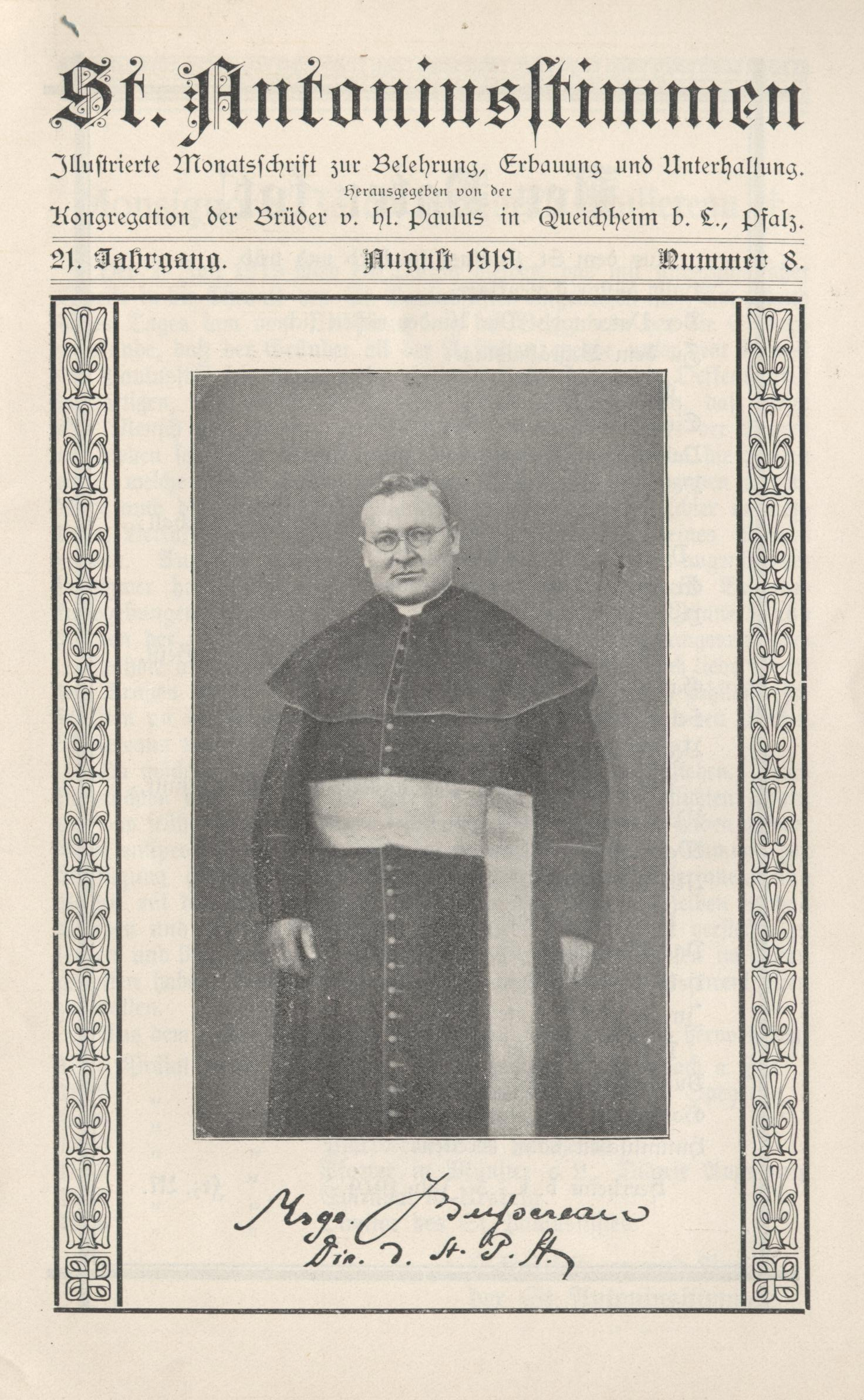 Prälat Jakob Bussereau, Diözese Speyer, Ordensstifter